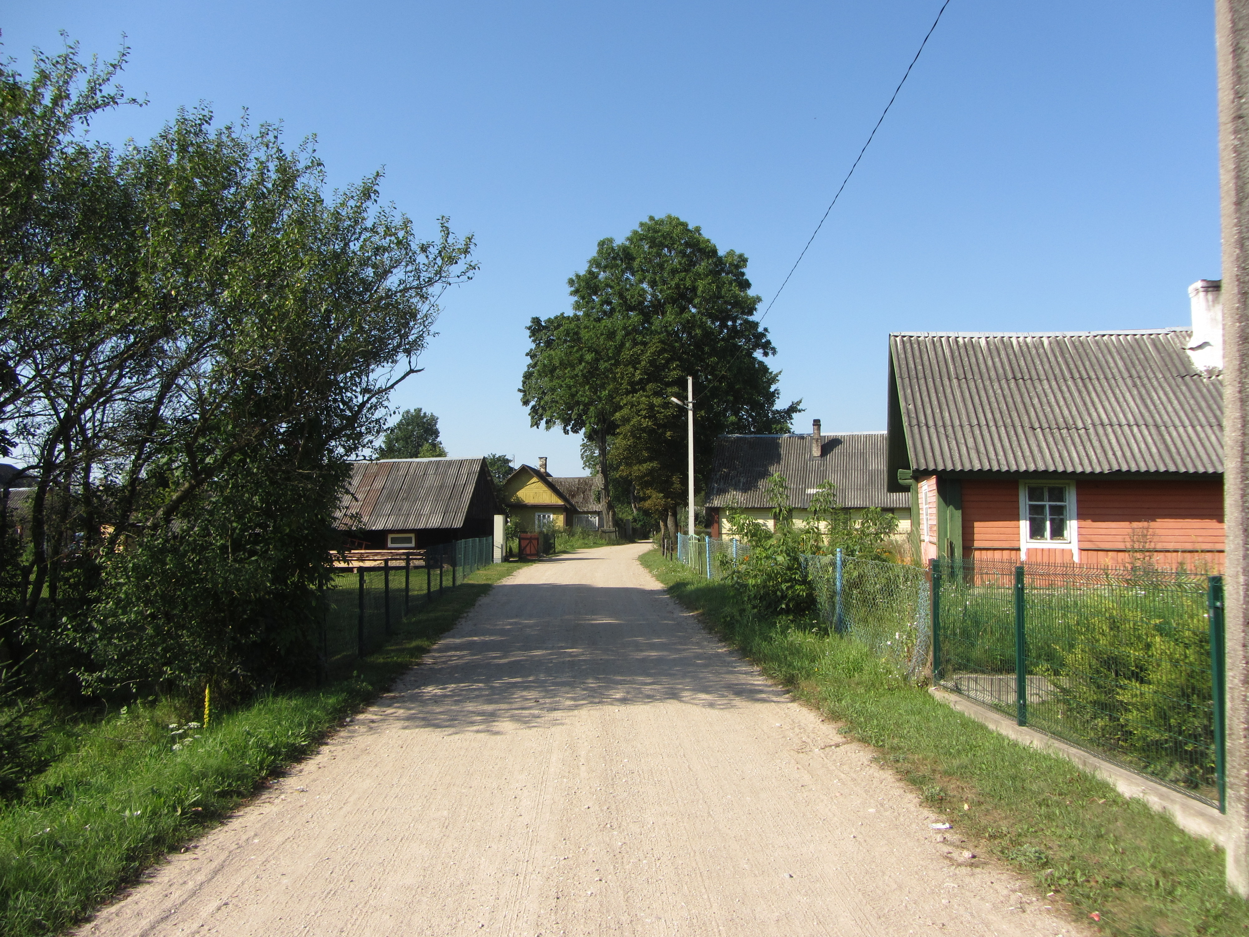 Pakenė 13145, Lithuania